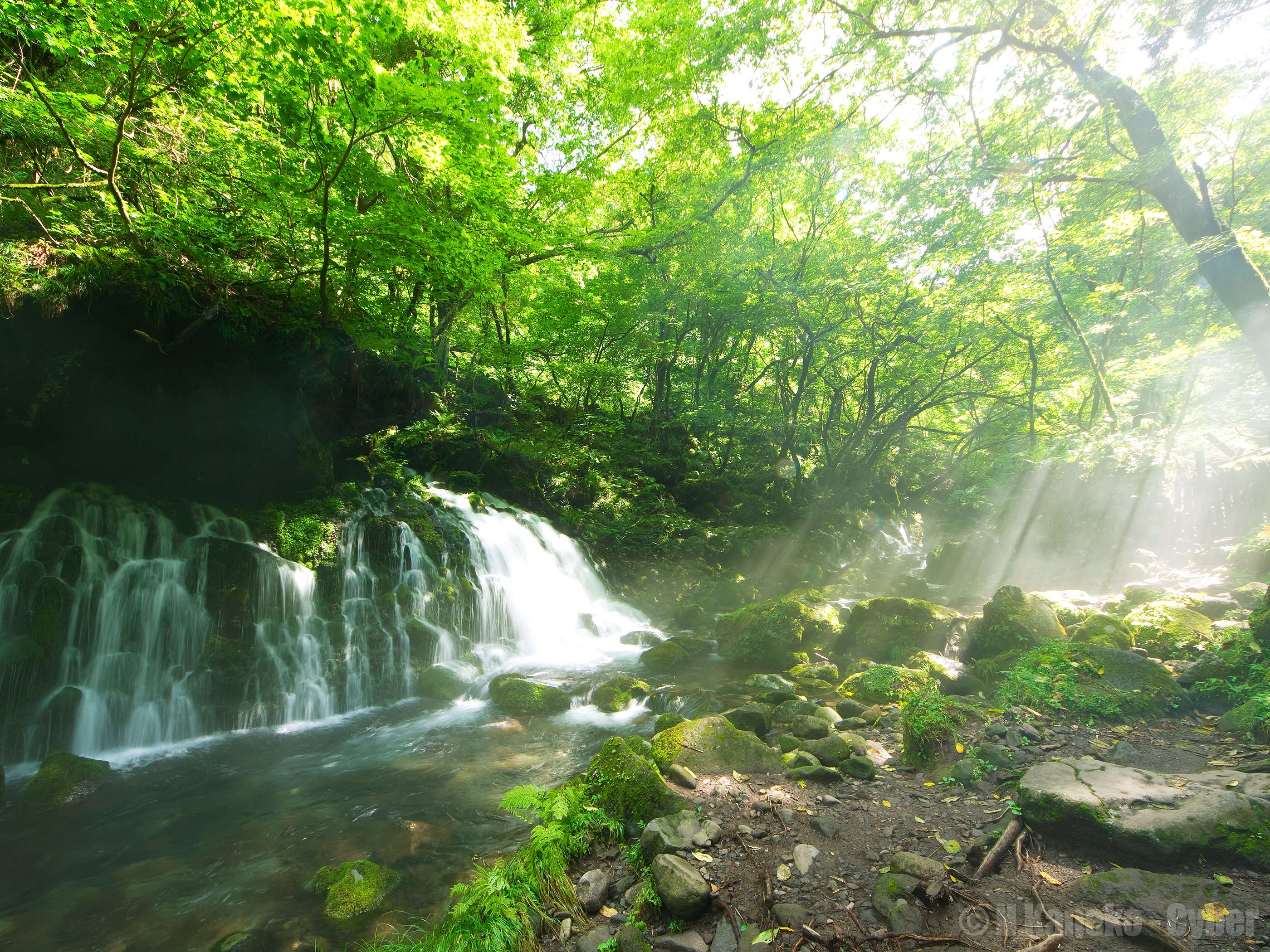 元滝伏流水と木漏れ日 (Mototaki Fukuryu-sui waterfalls) 23 Aug, 2014